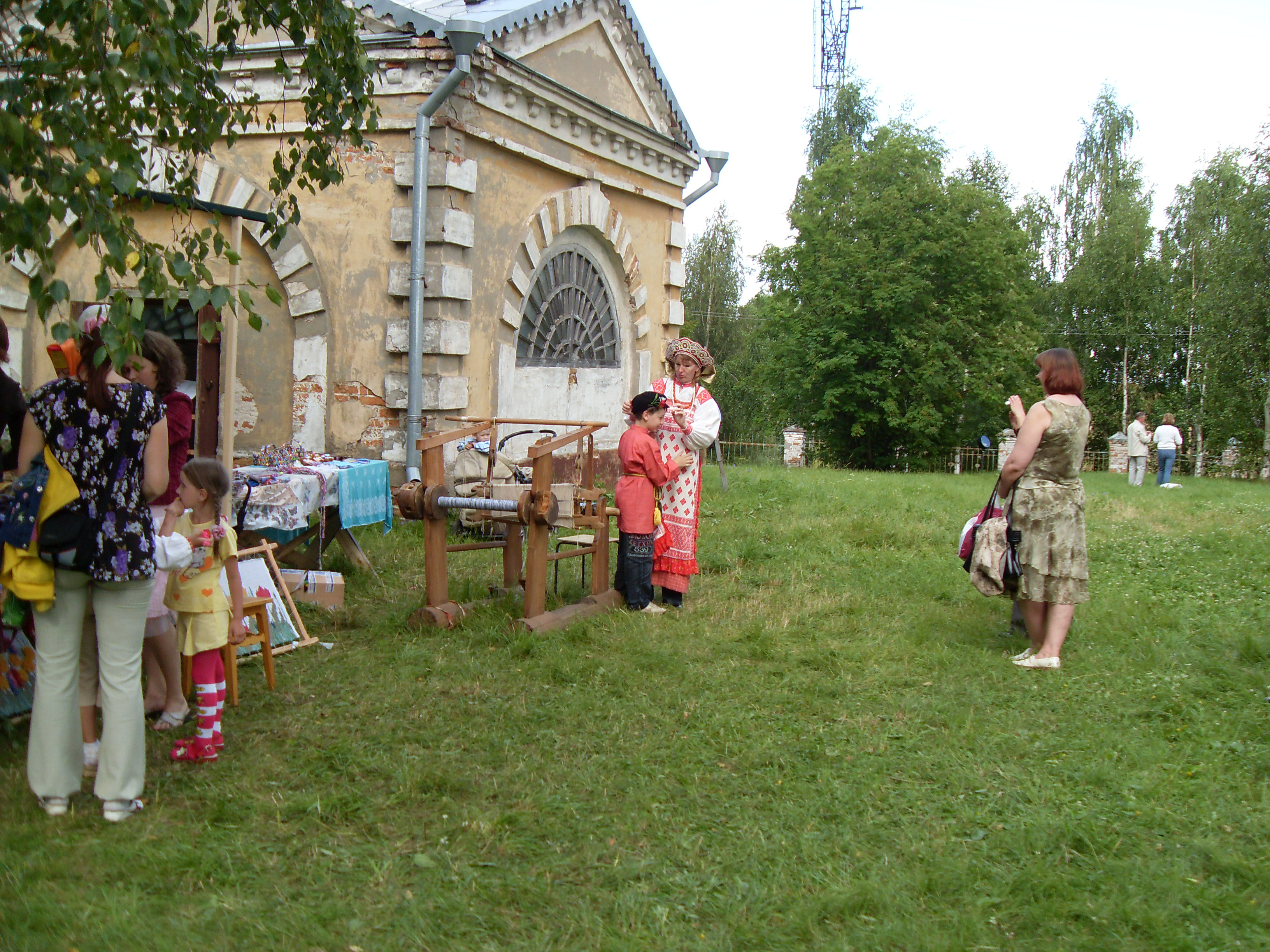 Усыпальница Строгановых. Сольвычегодский историко-художественный музей.